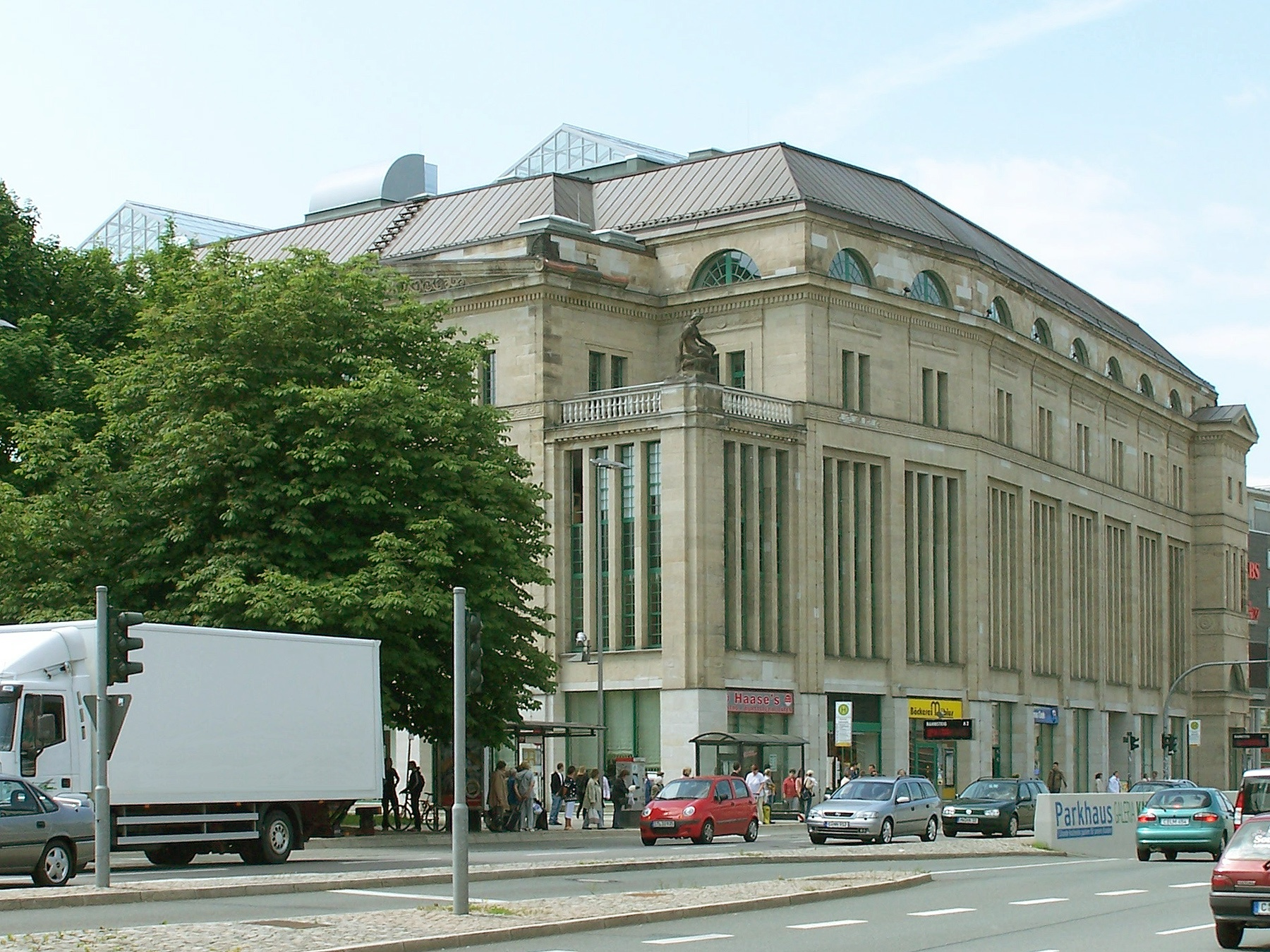 Das Kulturkaufhaus DAStietz in Chemnitz mit Skulptur „Sitzende“ von Johannes Knubel (1913)